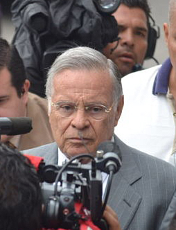 Miguel Ángel Rodríguez, former president of Costa Rica(1998-2002).